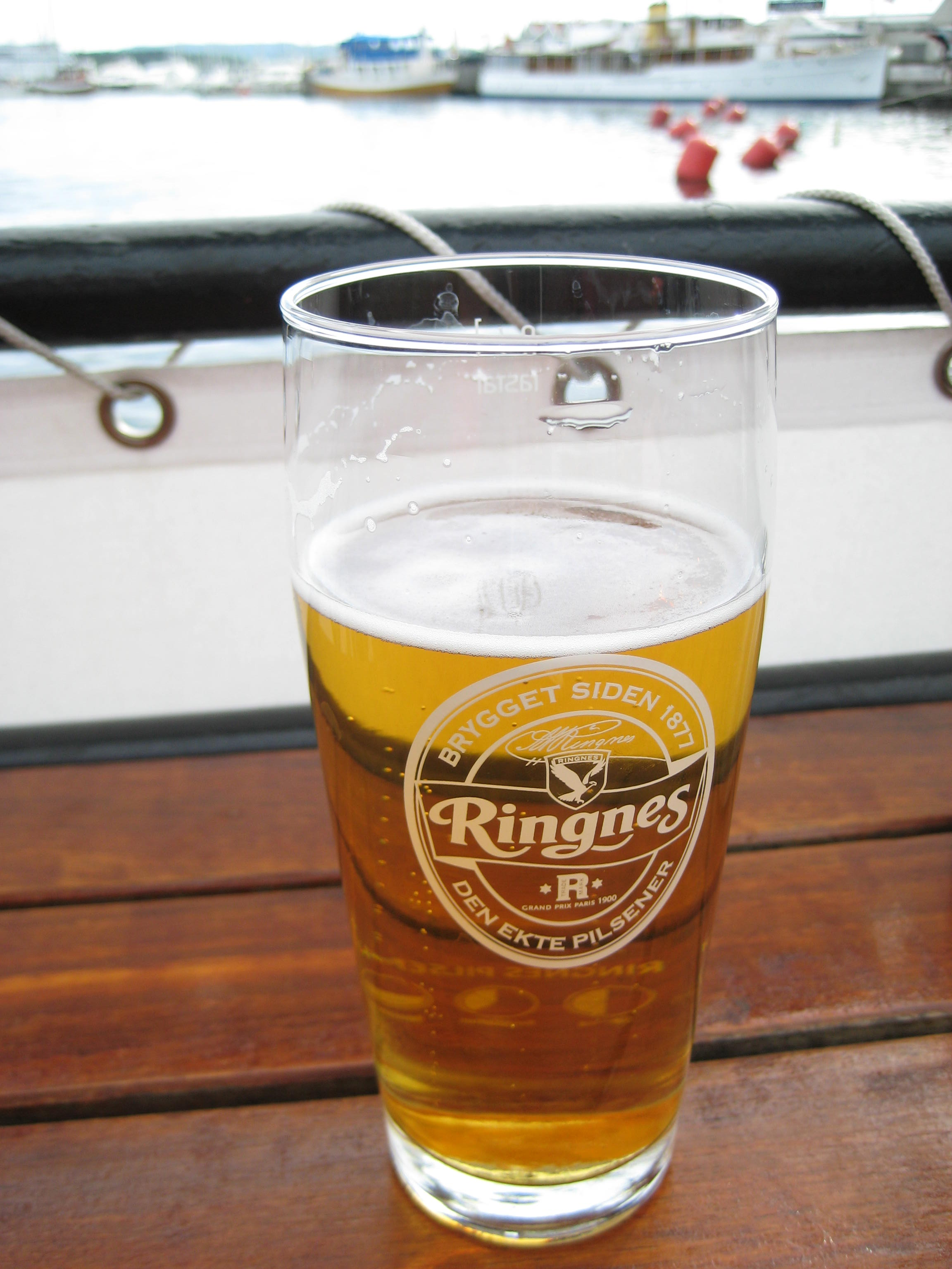 Produkt der Ringnes, aufgenommen in Oslo